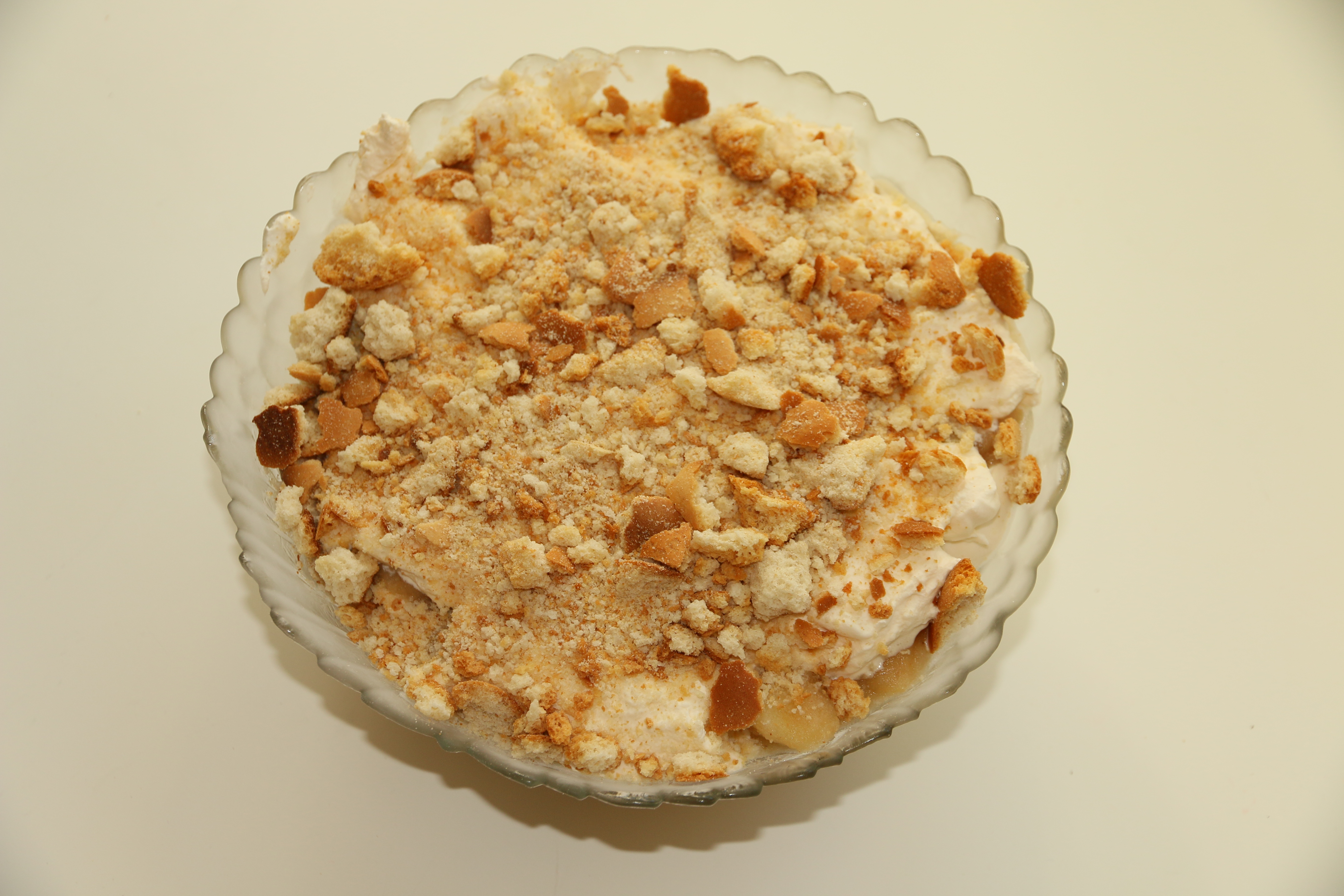 Bondepiker.